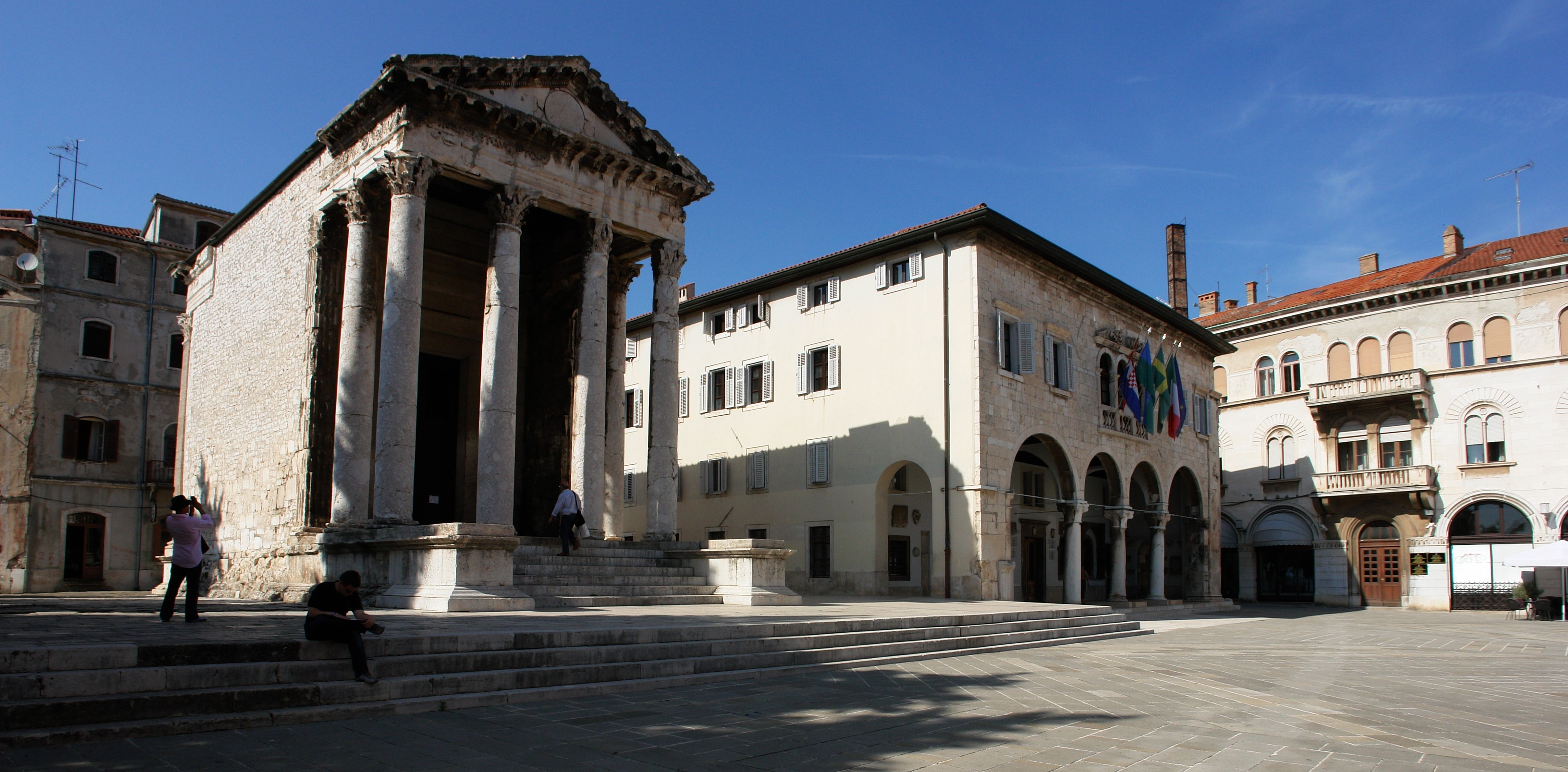 Augusztusz temlom, Pola. Temple of Augustus, Pula. Augustov hram, Pula.